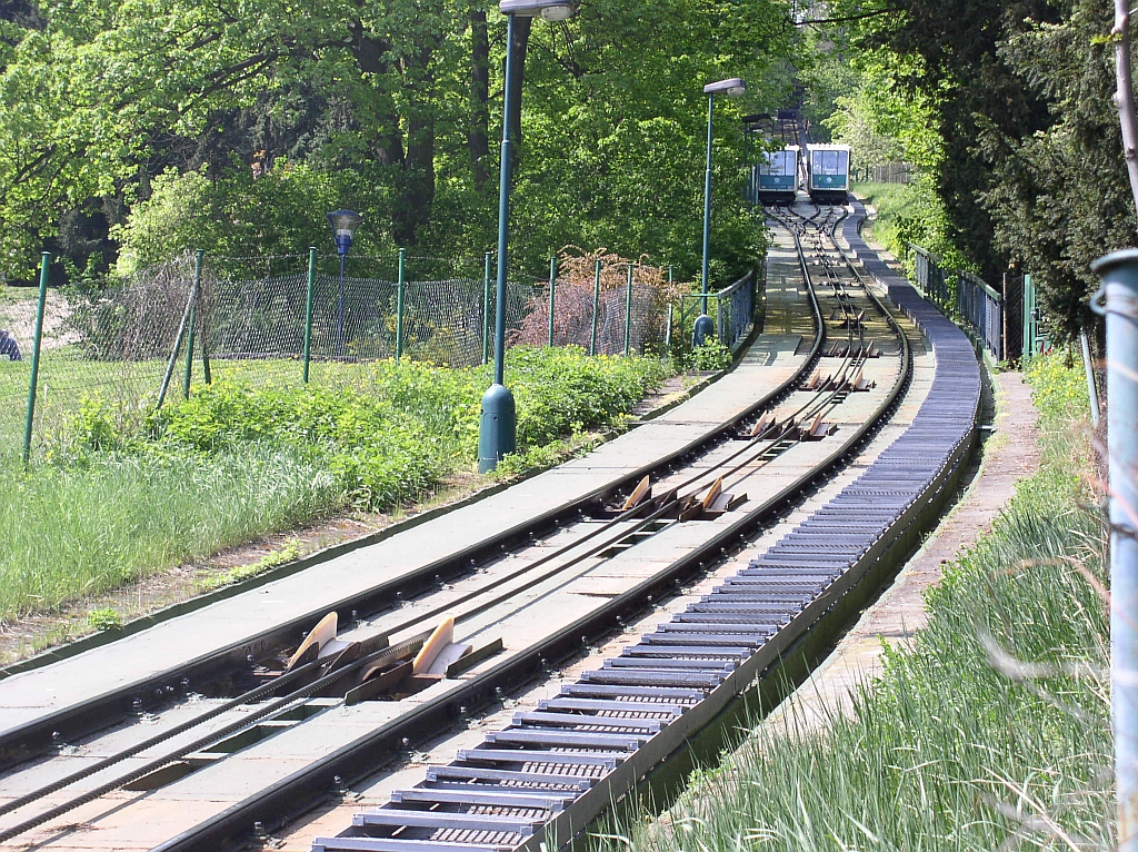 Rail cableway of Petřín in Prague – Lanová dráha na Petřín v Praze